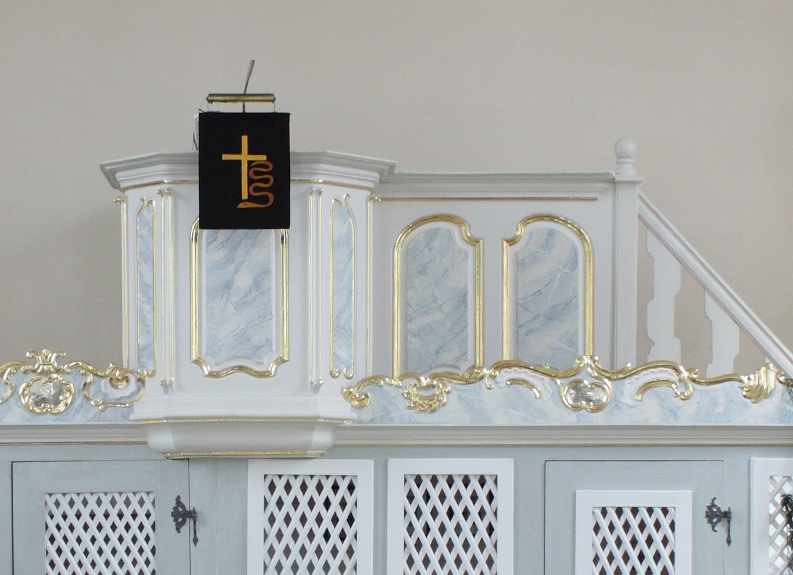 kirche hochstätten, innenraum, deatailblick auf altar und pfarrgestühl